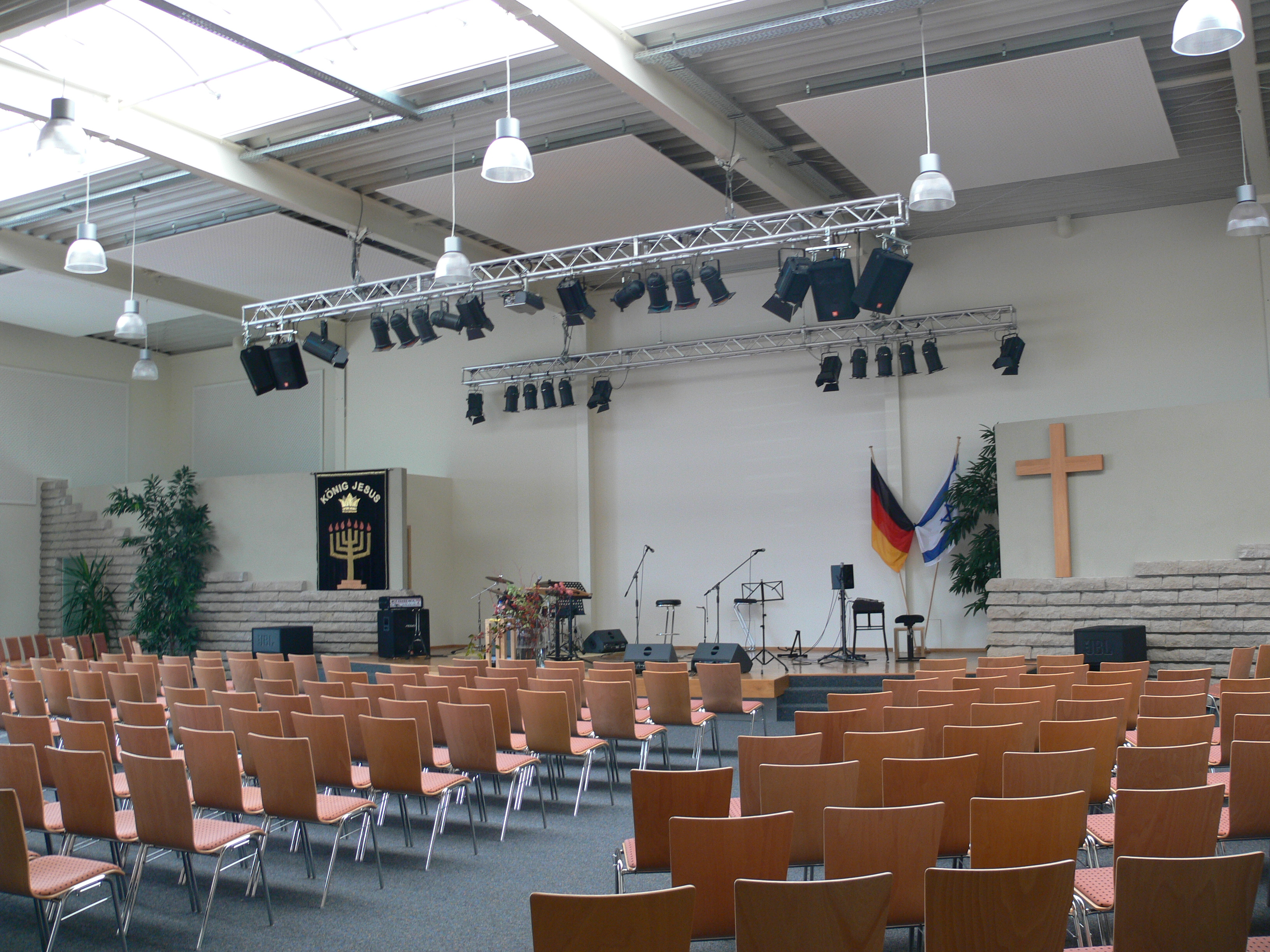 Freie Christengemeinde Ravensburg ( Meersburger Str. 150, Ravensburg: Großer Saal